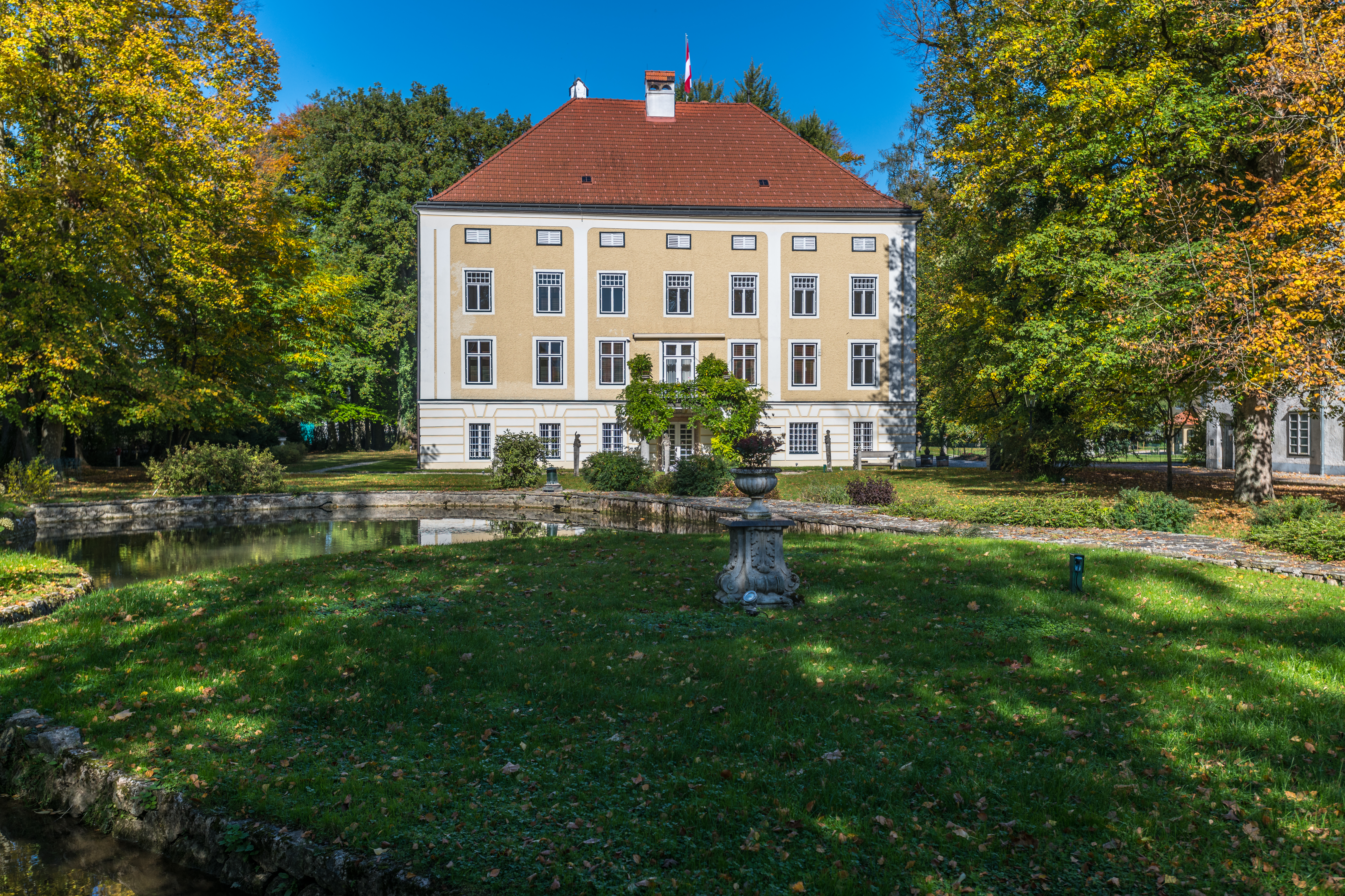 Schloss Oberweis (Laakirchen)